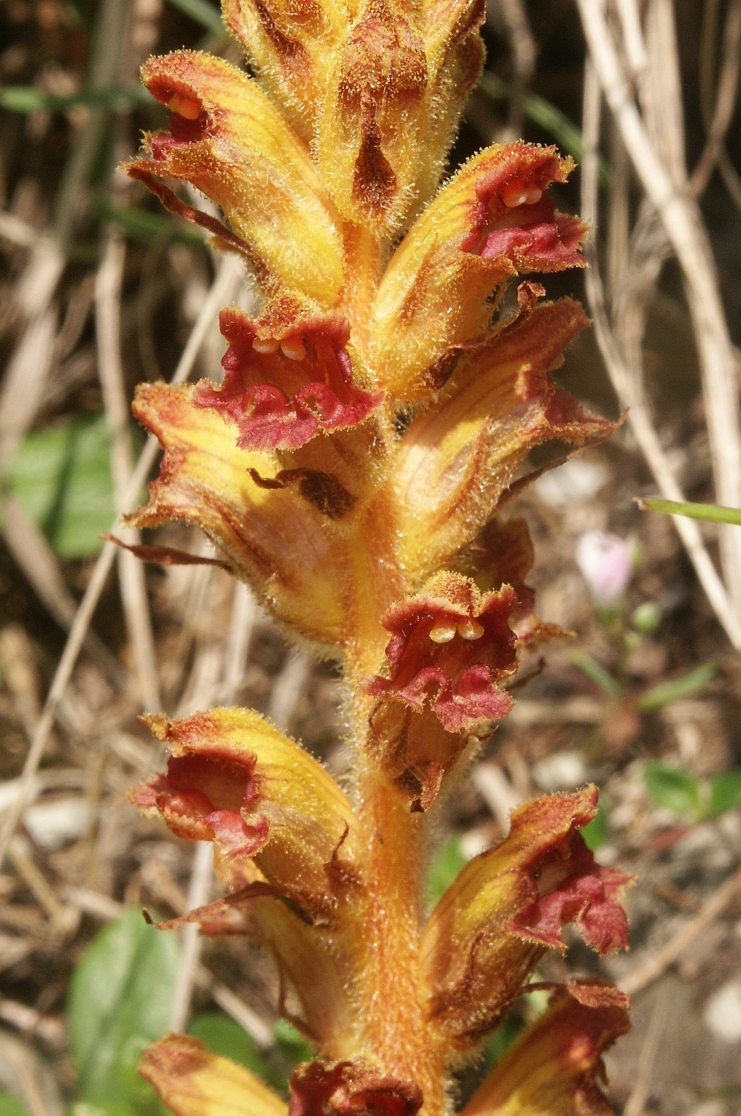 Orobanche gracilis, Berchtesgadener Alpen, Austria